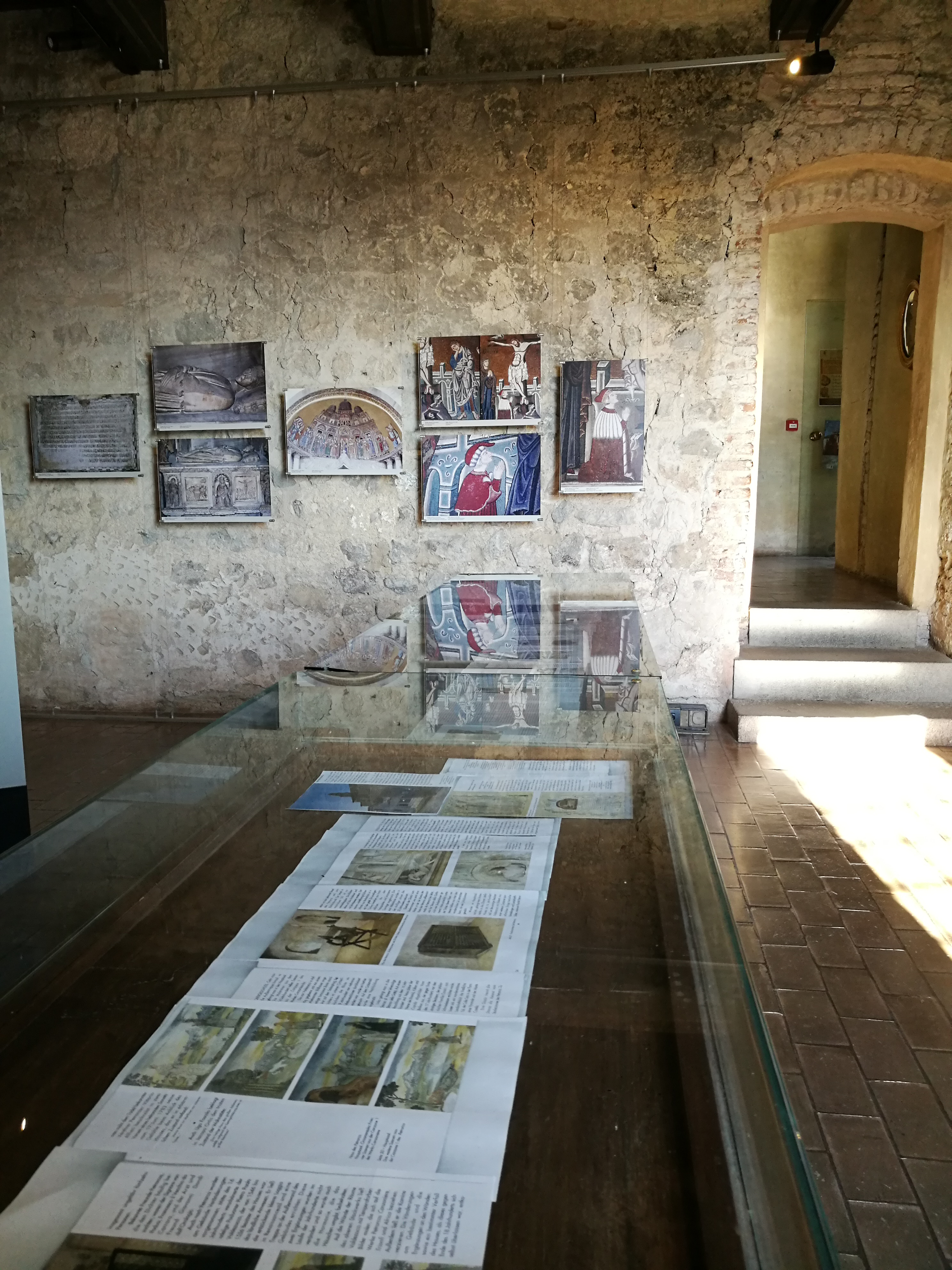 casa del Petrarca This is a photo of a monument which is part of cultural heritage of Italy.